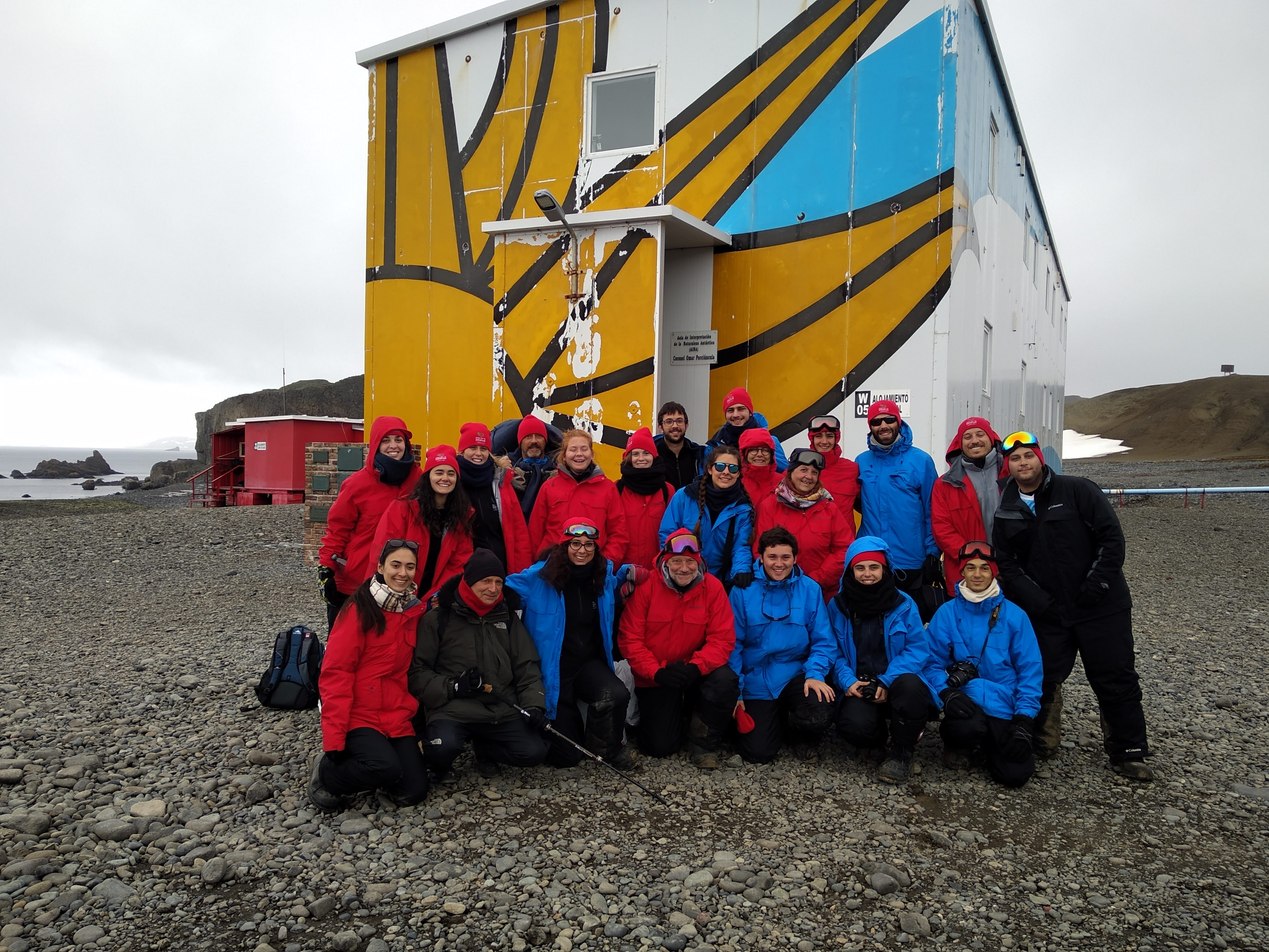 Docentes y estudiantes de la tercer edición de la EVIIA en la Base Científica Antártica Artigas, Península Fildes, Isla Rey Jorge en las islas Shetland del Sur.